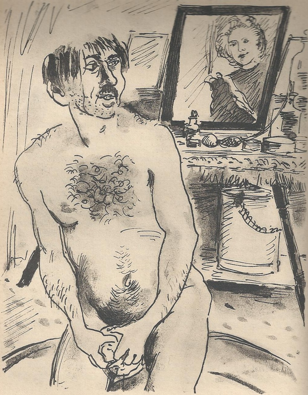 Illustration de Jean Launois (1898-1942), pour Le Journal d’une femme de chambre, roman d’Octave Mirbeau (1848-1917). Éditions Nationales, 1935.